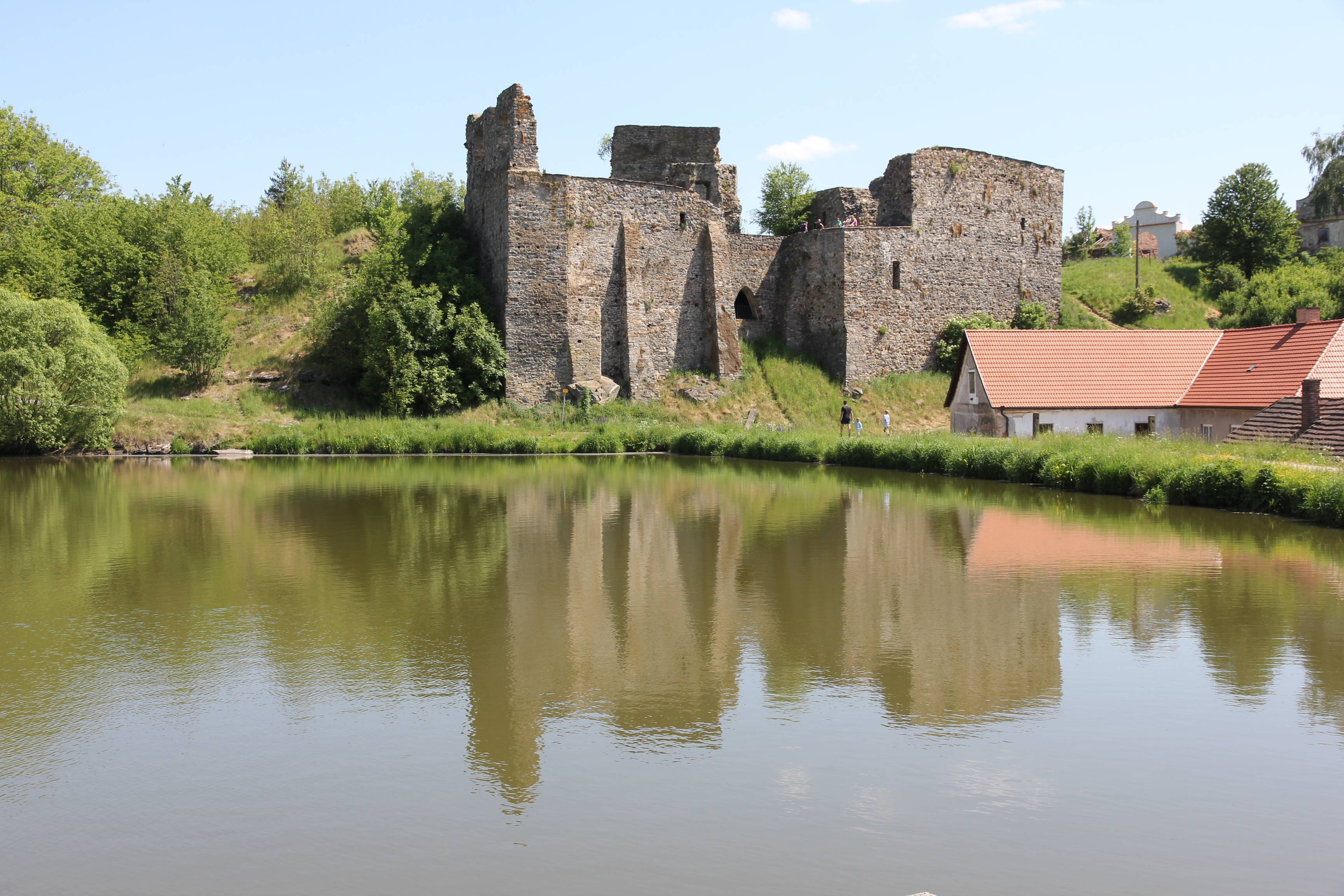 Hrad Borotín, zřícenina a archeologické stopy (Borotín), JV od vsi, Borotín